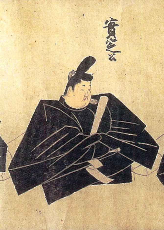 徳大寺実定の肖像画。